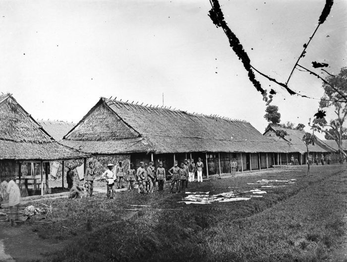 Negatief. Kazernes te Pankajene, Sulawesi